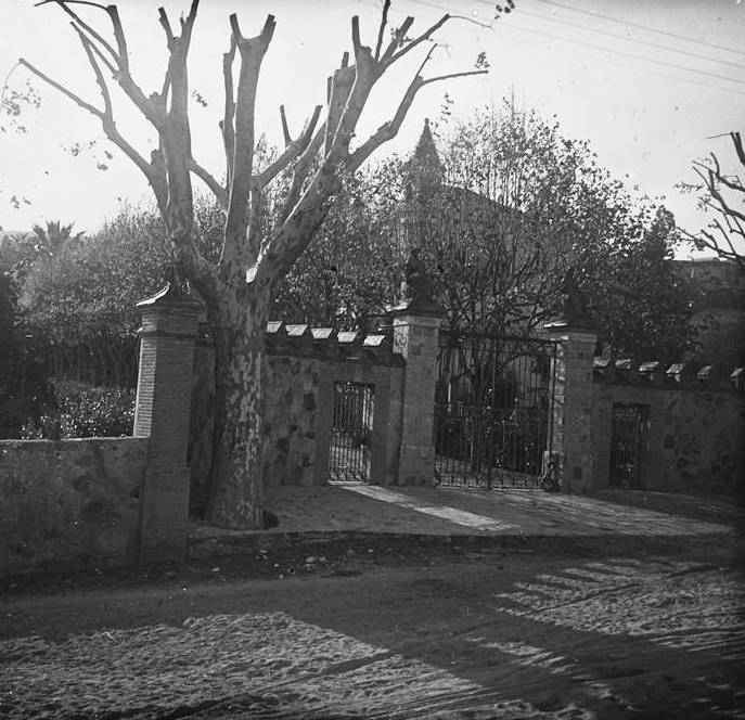 Torre Llimona a contrallum. Josep Salvany i Blanch (1923)